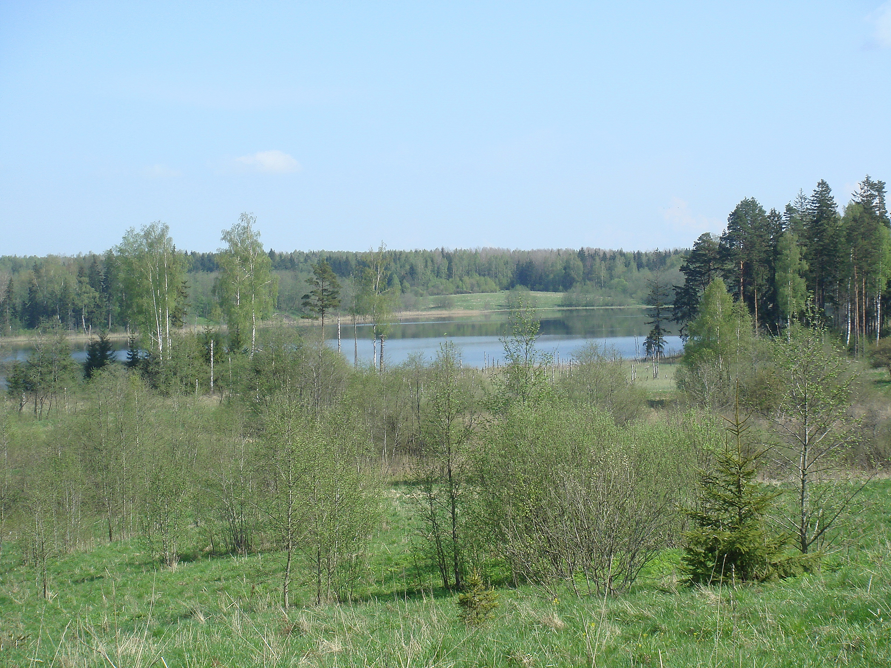 Reiņu ezers (Reinu lake), Latvia